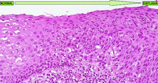 Preparació histològica d'una displàsia cervical